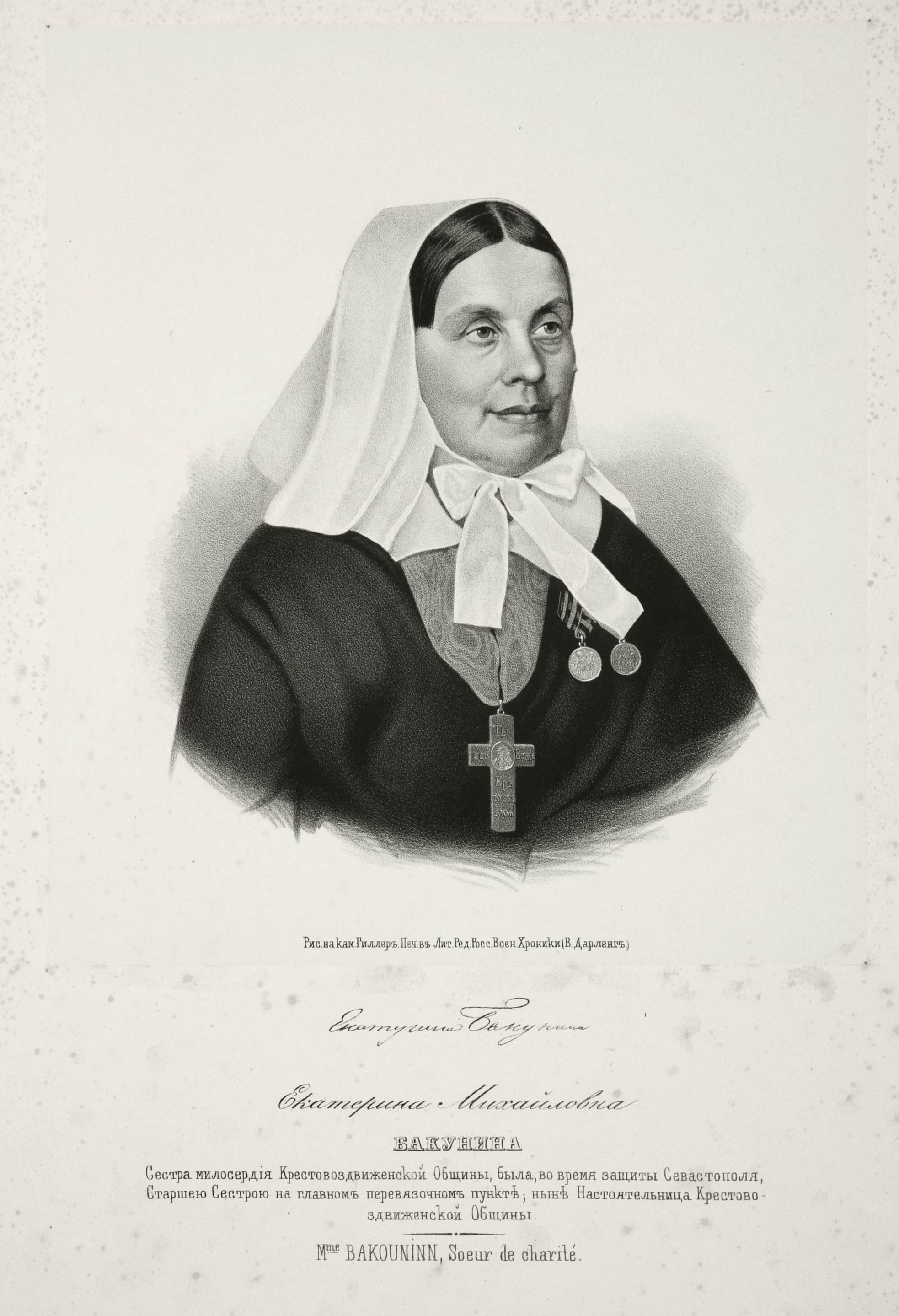 Екатерина Михайловна Бакунина — сестра милосердия, героиня двух войн XIX века.